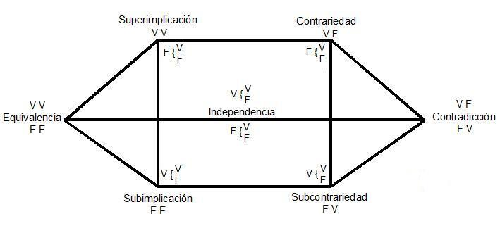 Cuadro de relaciones de expresiones de clases según J.J. Doyle, The modern Schoolman, 29, (1952), 93-94